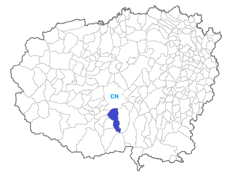 Posizione del comune nella provincia di Cuneo